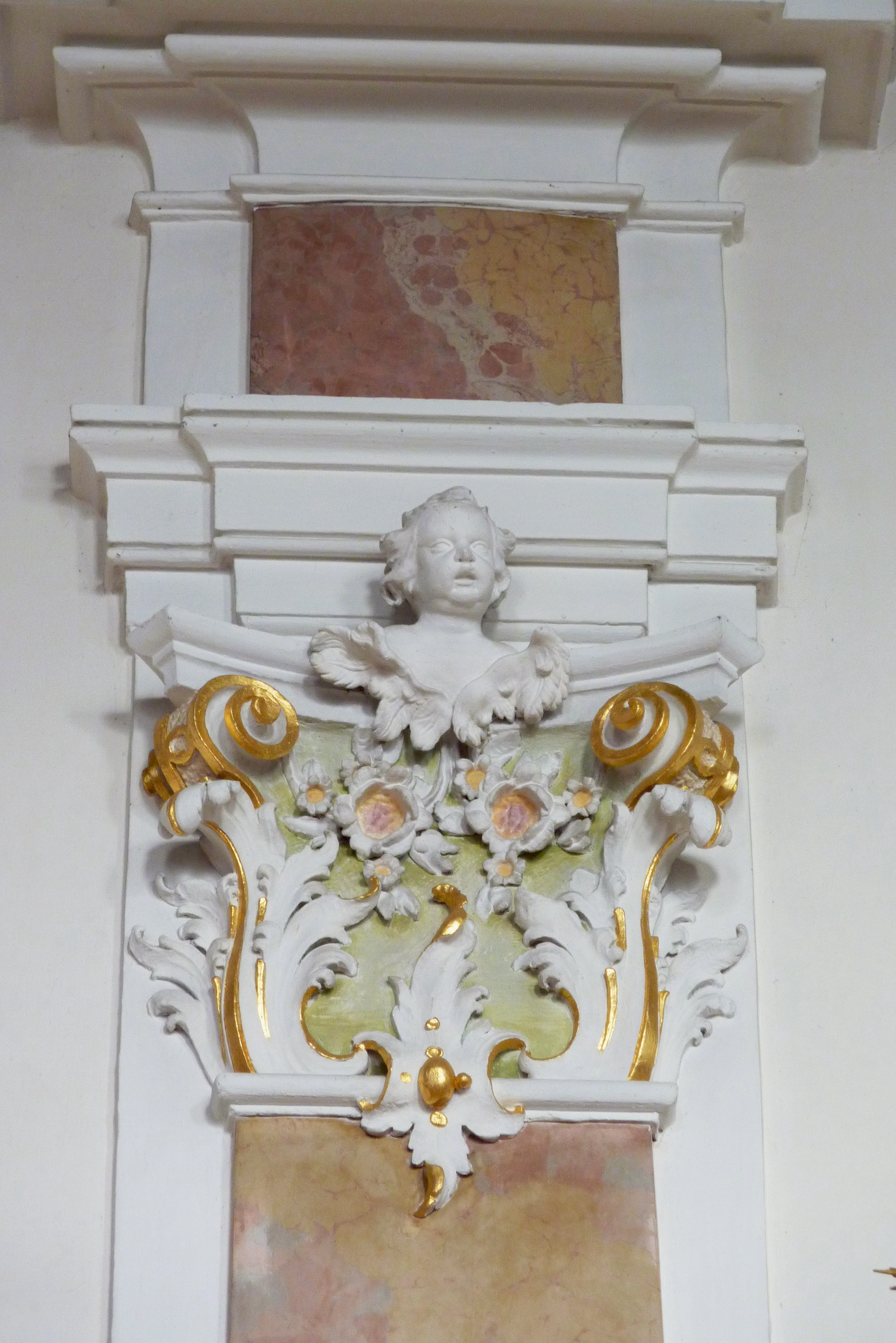 Katholische Pfarrkirche St. Vitus in Donaualtheim (Dillingen an der Donau), Kapitell mit Engelskopf, Stuck von Christian Greinwald